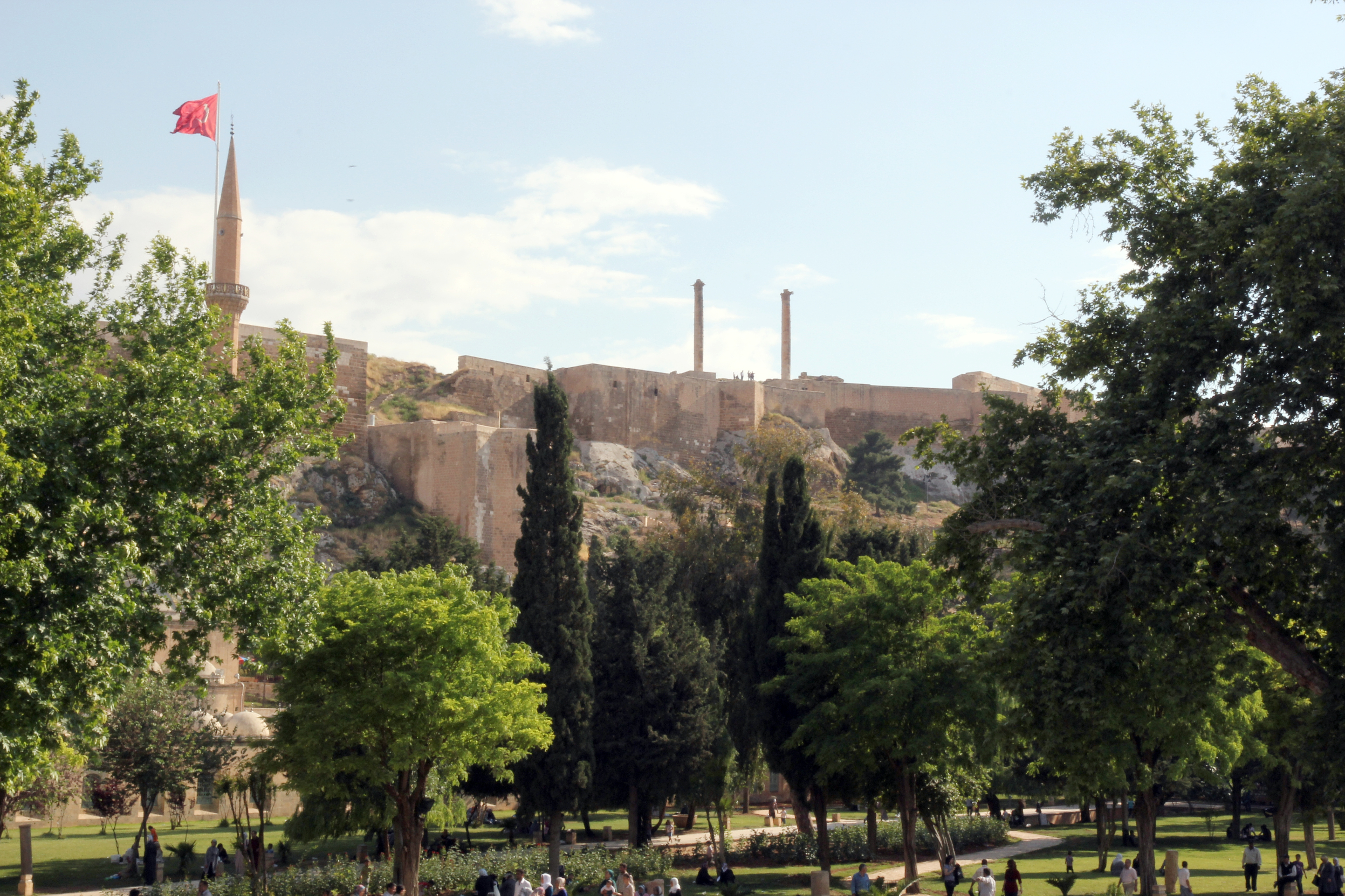 Burg von Şanlıurfa, Türkei